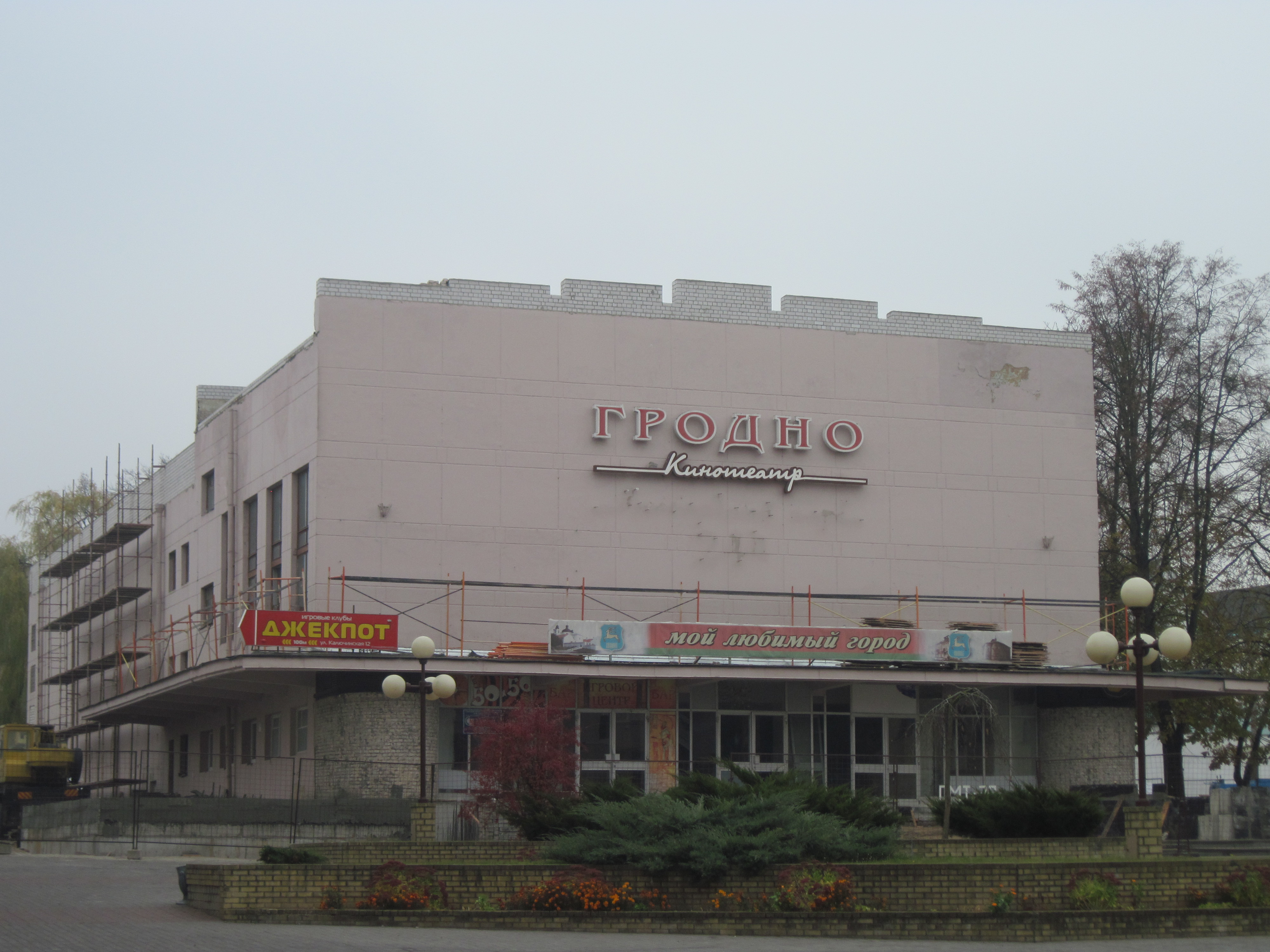 Беларуская (тарашкевіца): Выява кінатэатра "Гродна" №9, вул Савецкая, Гродна.